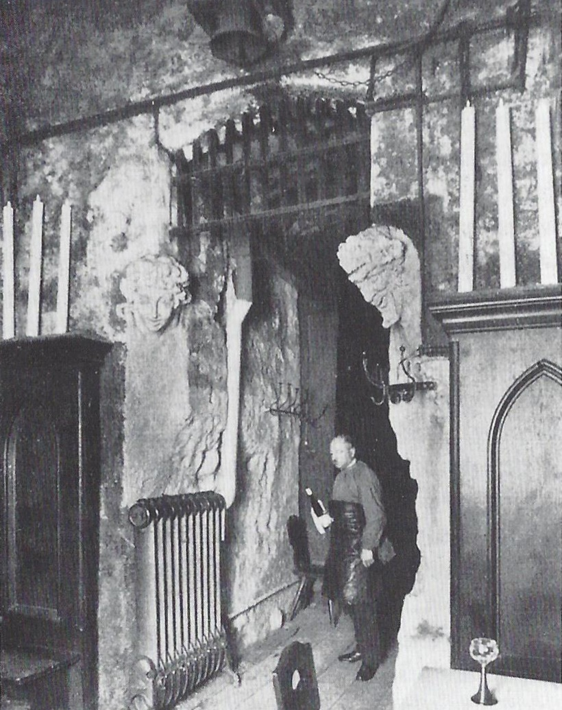 Eingang mit 2 Faunen zur Marterkammer im Königsberger Blutgericht; Kellner im „Krupsch“.